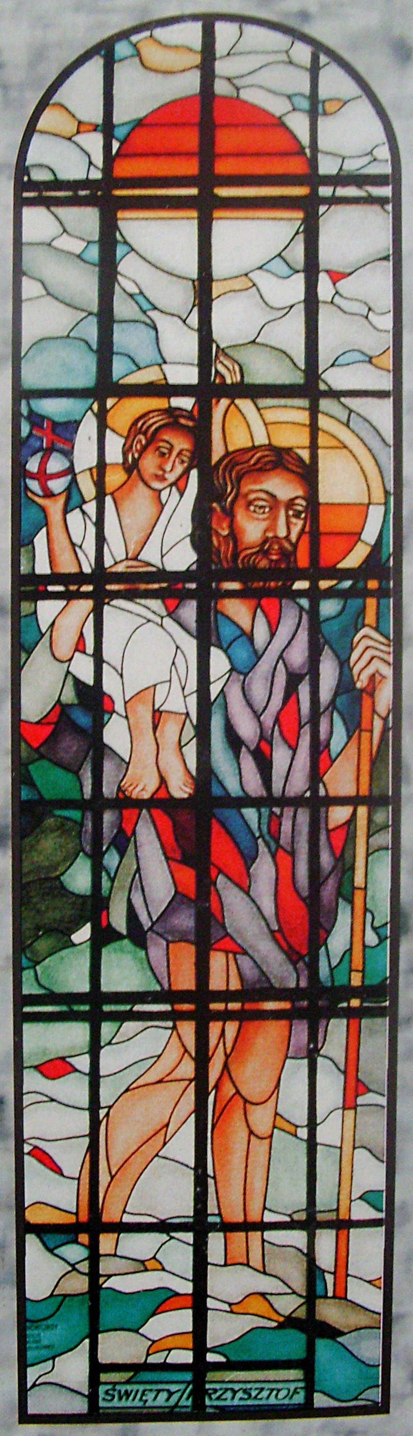 św. Krzysztof - witraż w kościele Imienia Maryi w Bączalu Dolnym (diecezja rzeszowska)